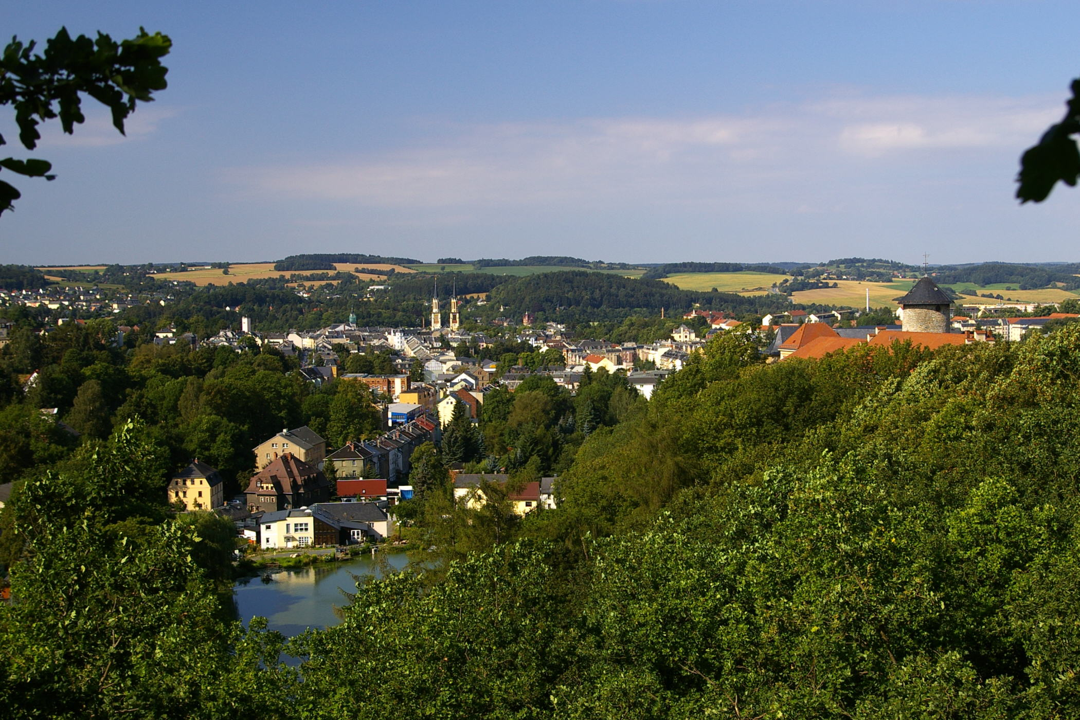 Oelsnitz/V. Ansicht von Osten